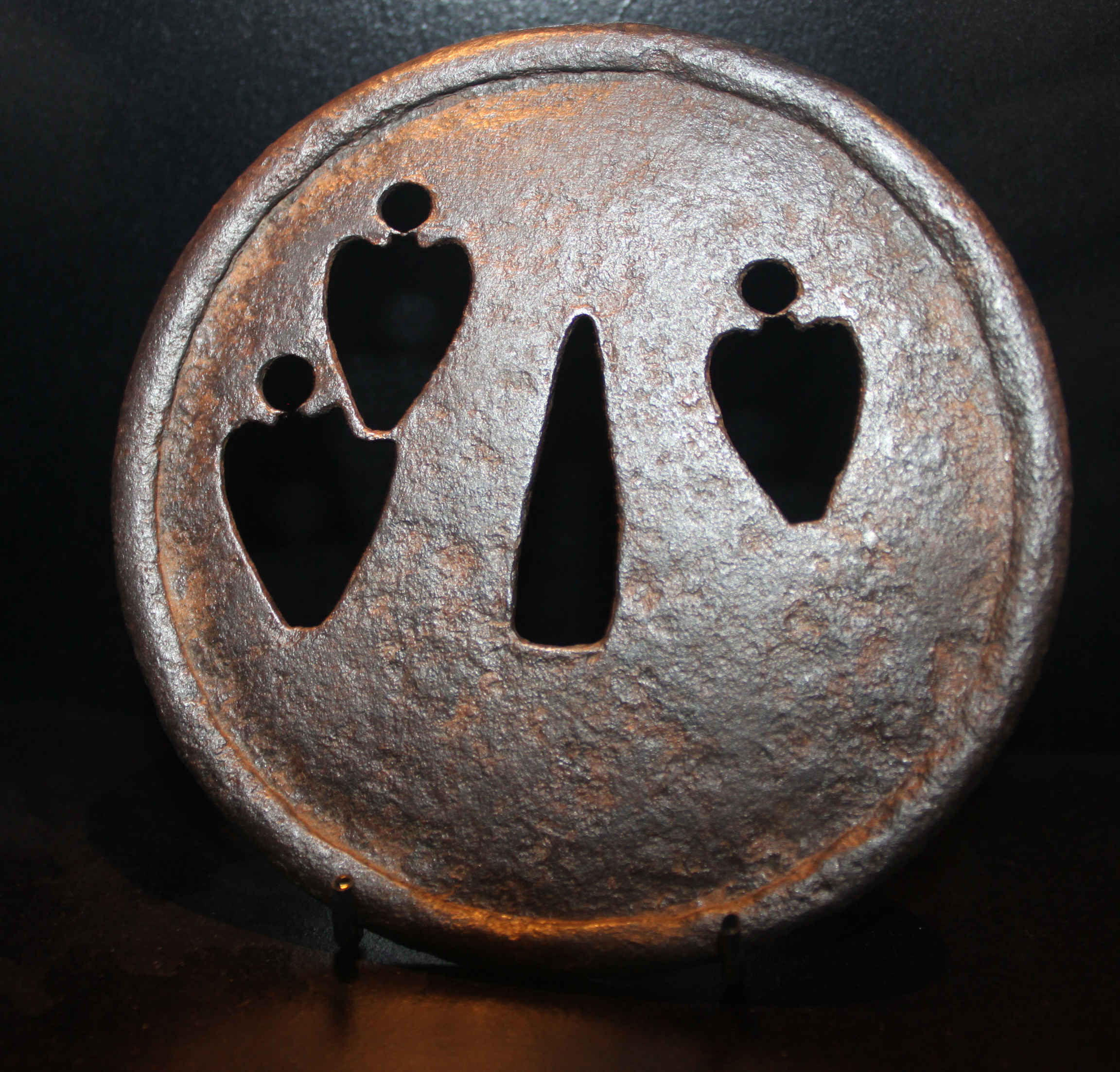 Parerplåtar på Östasiatiska museet Östasiatiska museet har en samling av över 800 parerplåtar (tsuba). Här visas tsuba från flera olika samlingar, främst från NM-1912 (Oscar Björck) och OM-1979 (Karl och Gulli Modéer). Detta är den äldsta parerplåten i Östasiatiska museets samling. Parerplåt (tsuba) med genombrytningar. Järn. Sannolikt tidig Muromachi-period (1392-1573). Gåva av Karl och Gulli Modéer. This is a photo of an artwork at the Museum of Far Eastern Antiquities in Sweden with the identifier: OM-1979-0061